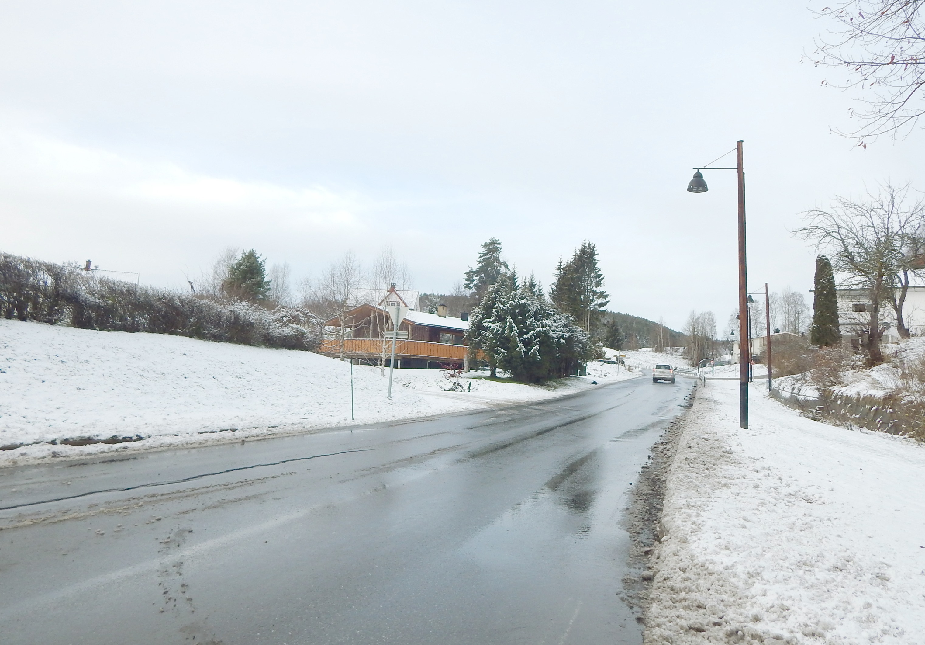 Fylkesvei 63 i Skotselv